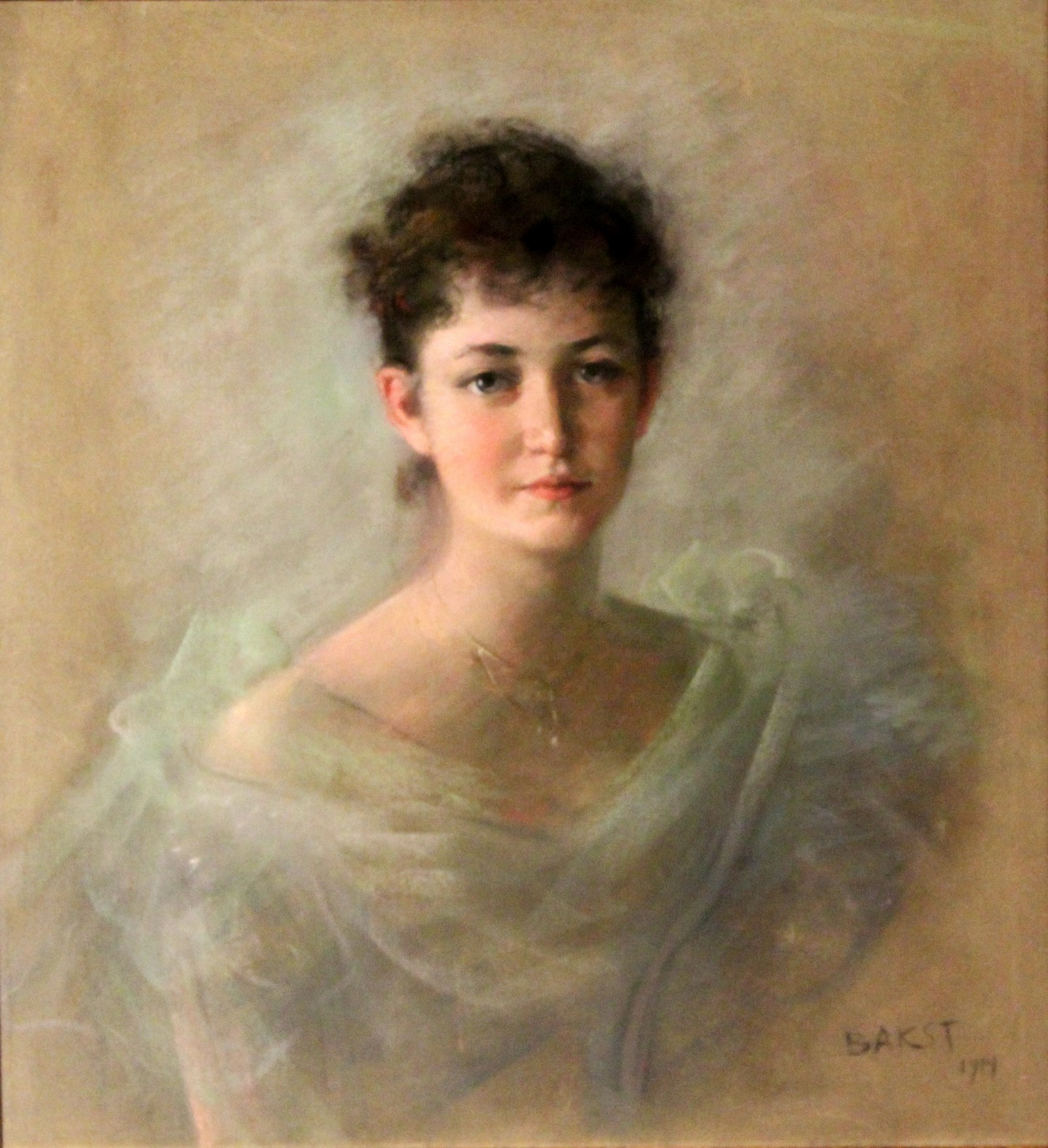 Бакст Лев. Портрет девушки в голубом (Ружены Затковой). 1914 Холст, пастель. Из корпоративной коллекции Белгазпромбанка